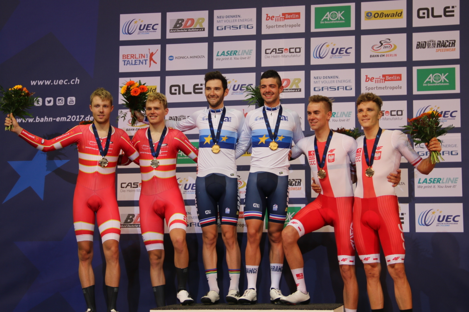 Podium Zweier-Mannschaftsfahren der Männer, v.l.n.r.: Casper Pedersen, Niklas Larsen, Benjamin Thomas, Florian Maitre, Wojciech Pszczolarski, Daniel Staniszewski